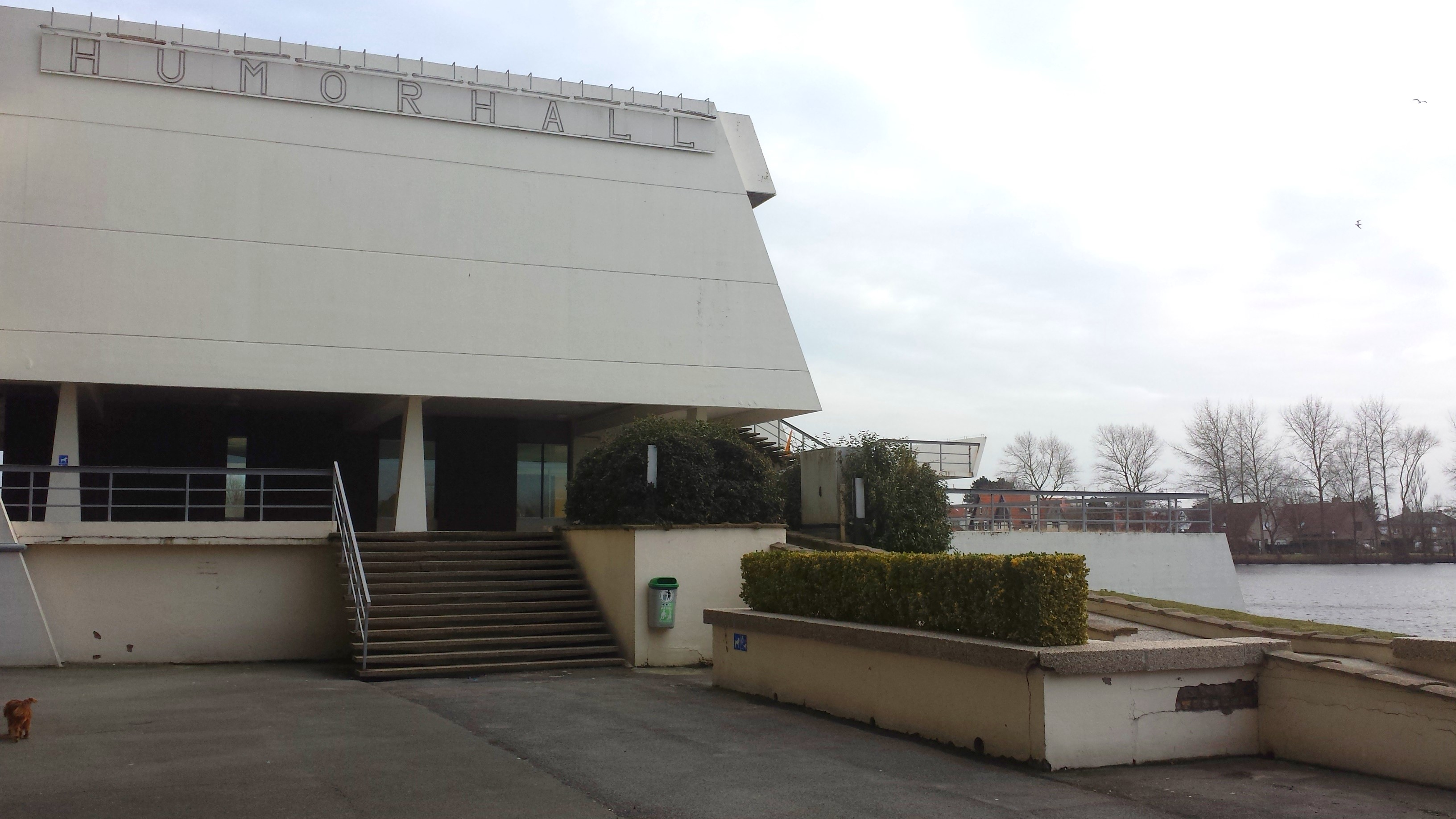 Humorhall, Krommedijk 57, 8300 Knokke-Heist, België